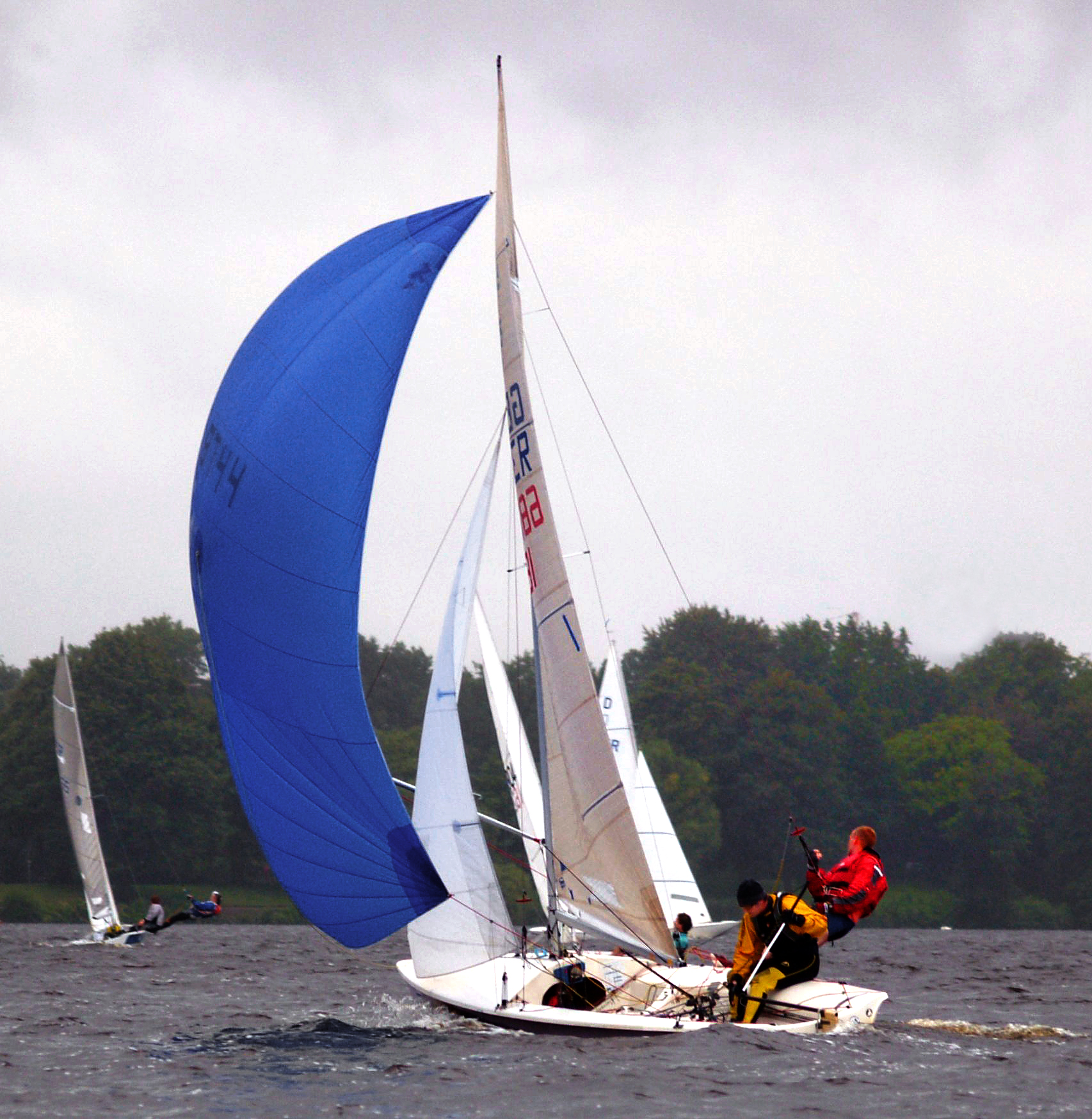 505 dinghy